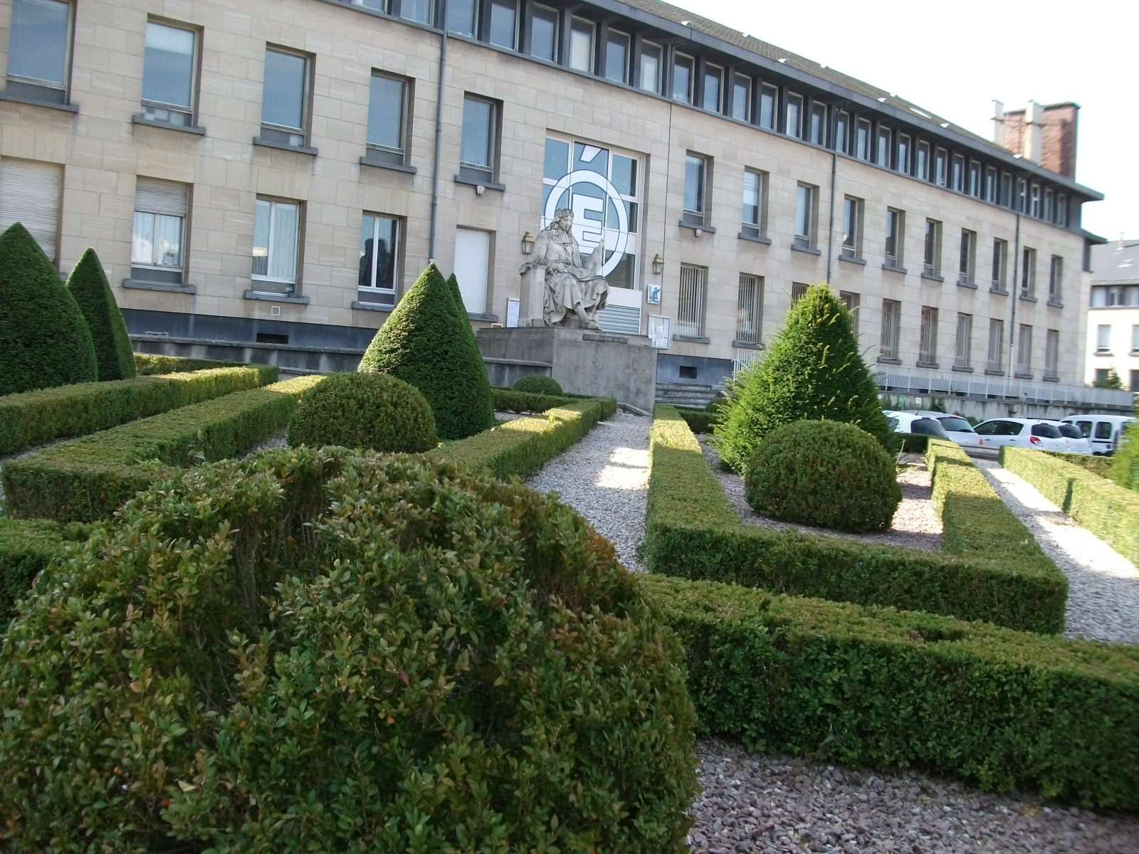 statue de Colbert devant le rectorat de Reims, rue Navier.